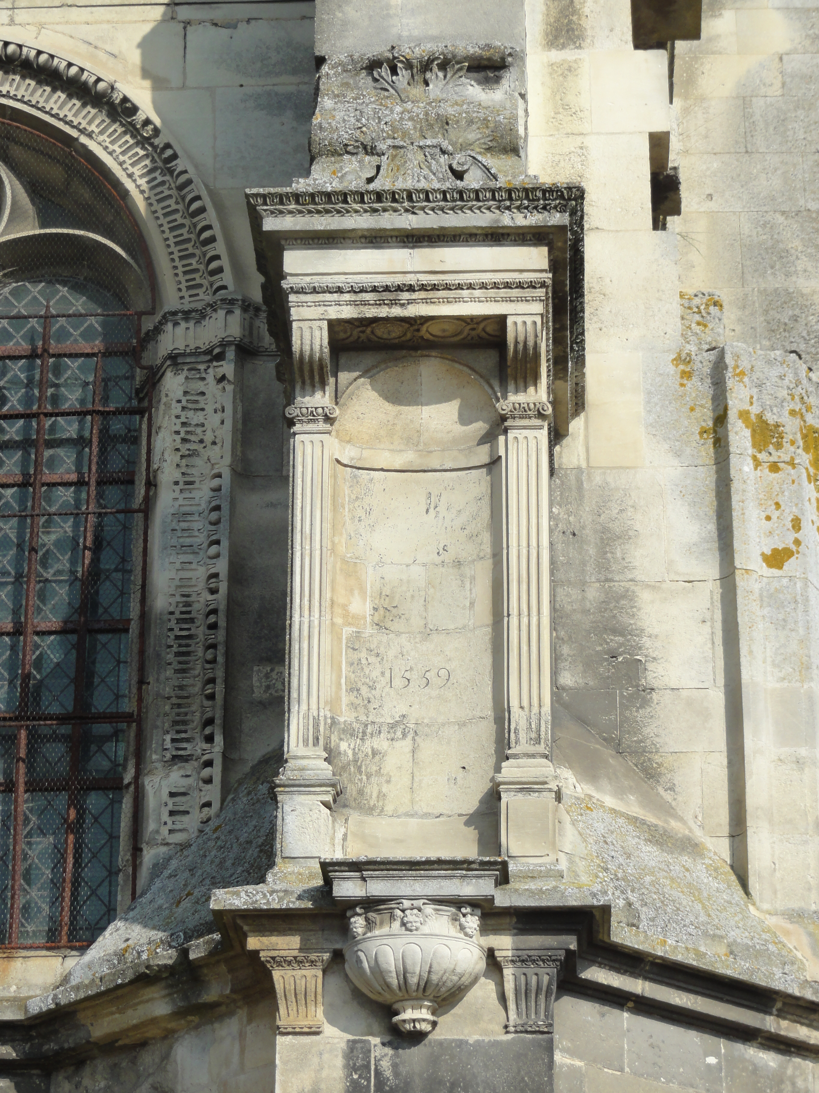 Voir titre.